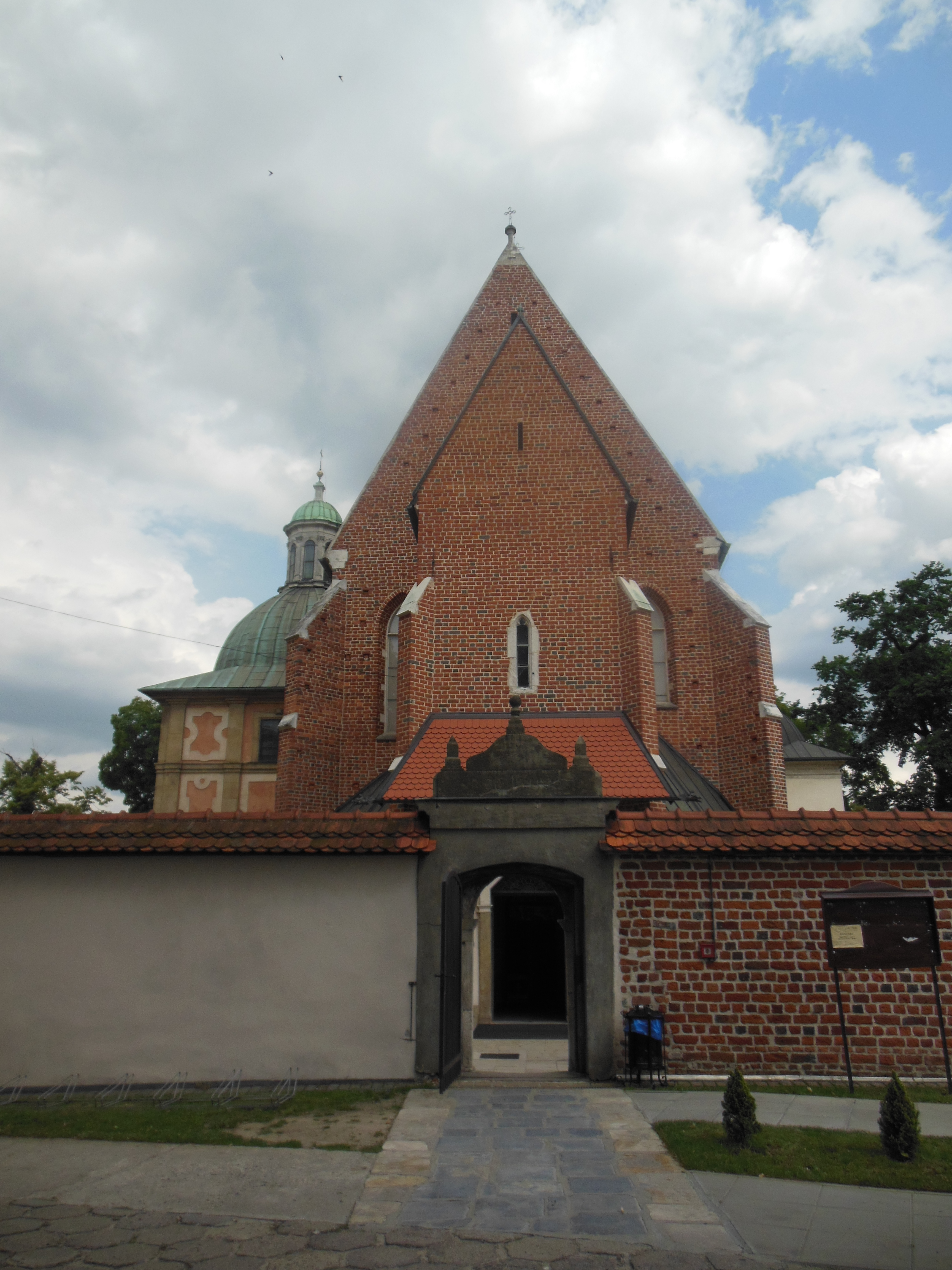 Fasada Kościoła św. 10000 Męczenników na Rynku w Niepołomicach.